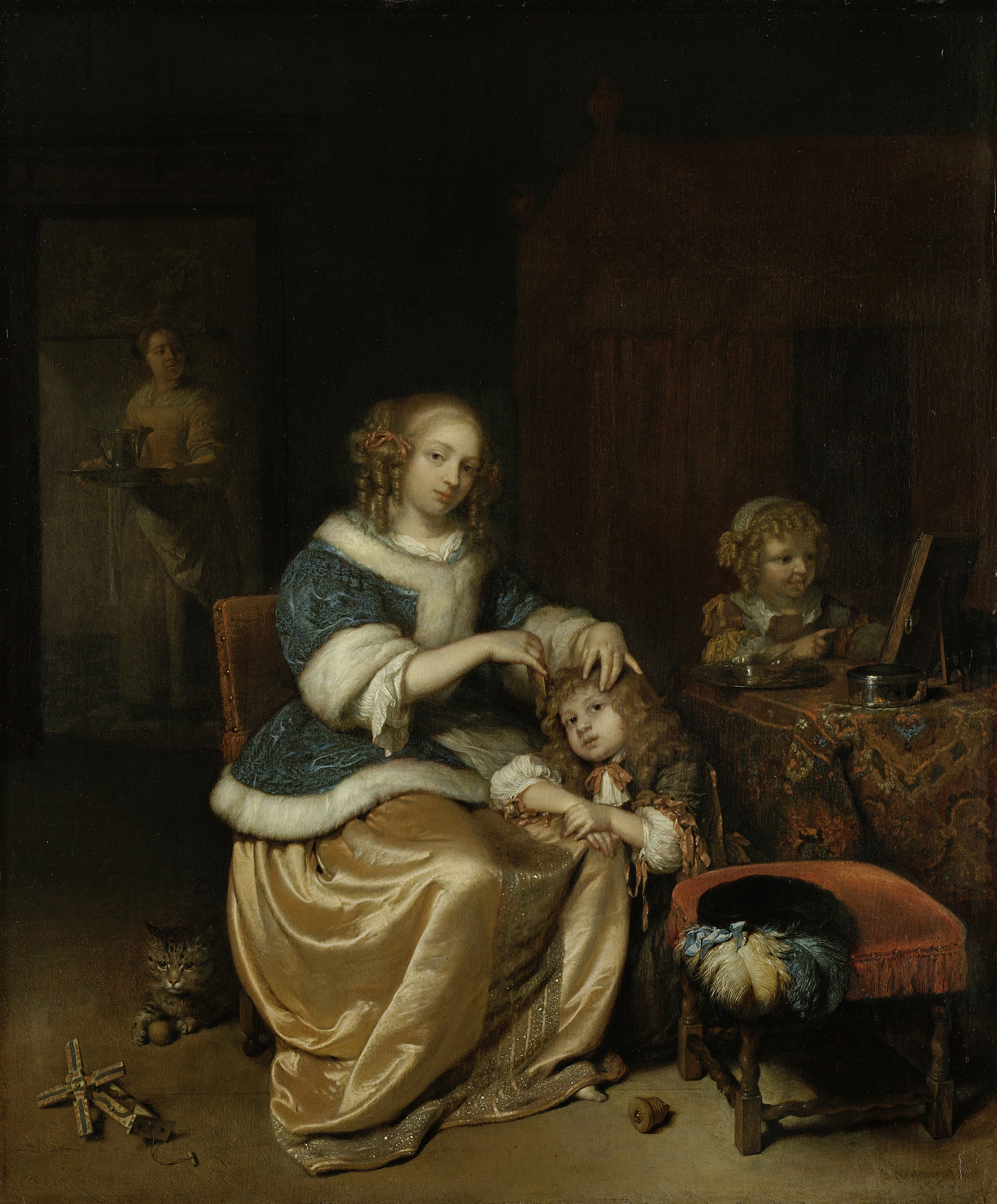 Moederzorg. Interieur met een moeder die haar kind kamt. Rechts trekt een meisje bekken voor een spiegel. Op de voorgrond ligt een baret met pluimen op een bankje. Links een kat met een balletje en een speelgoed molentje. Op de achtergrond staat een meid met een blad in de deuropening.; Caspar Netscher (1639–1684), olieverf op paneel, 1669